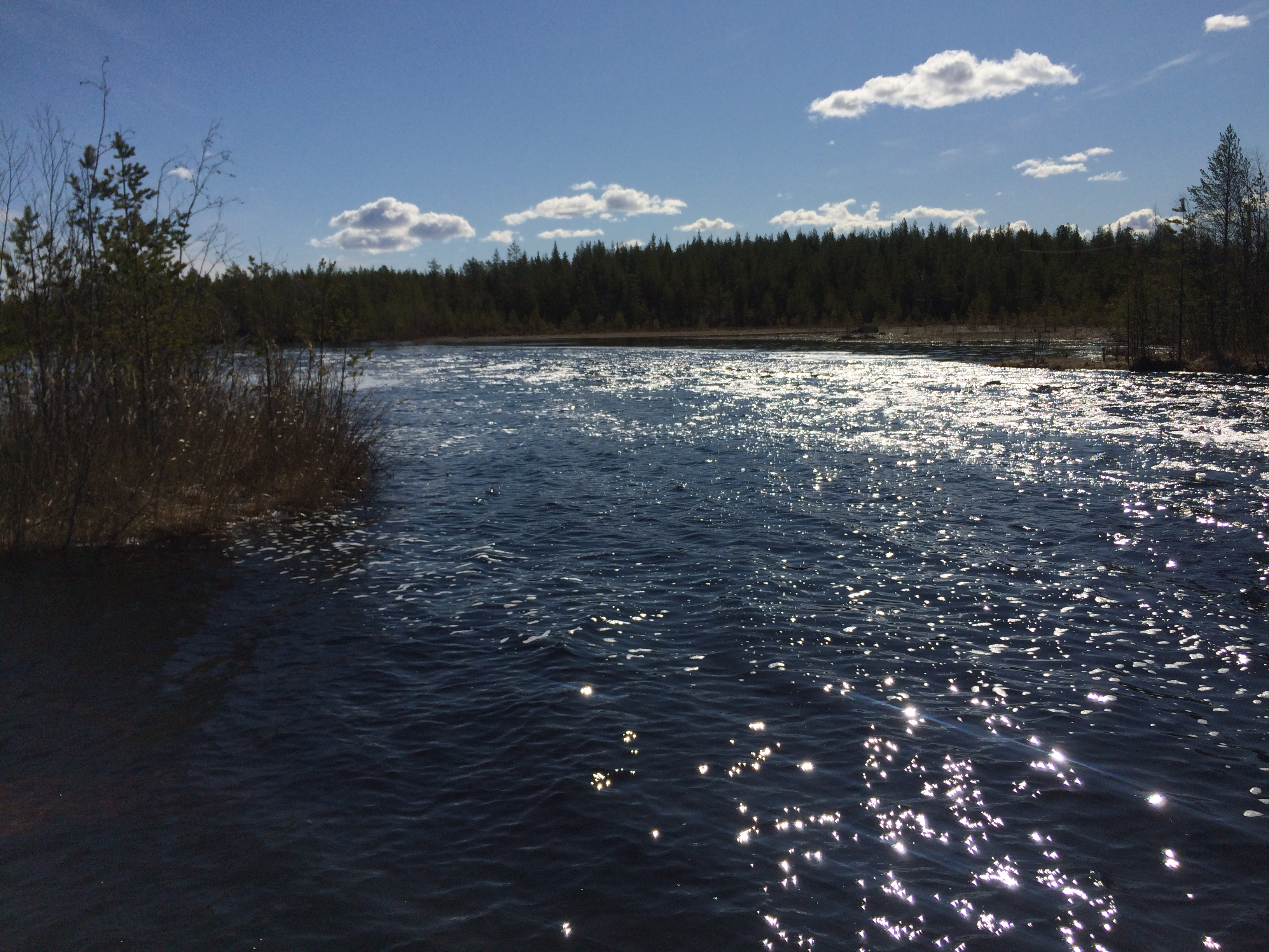 Пезега